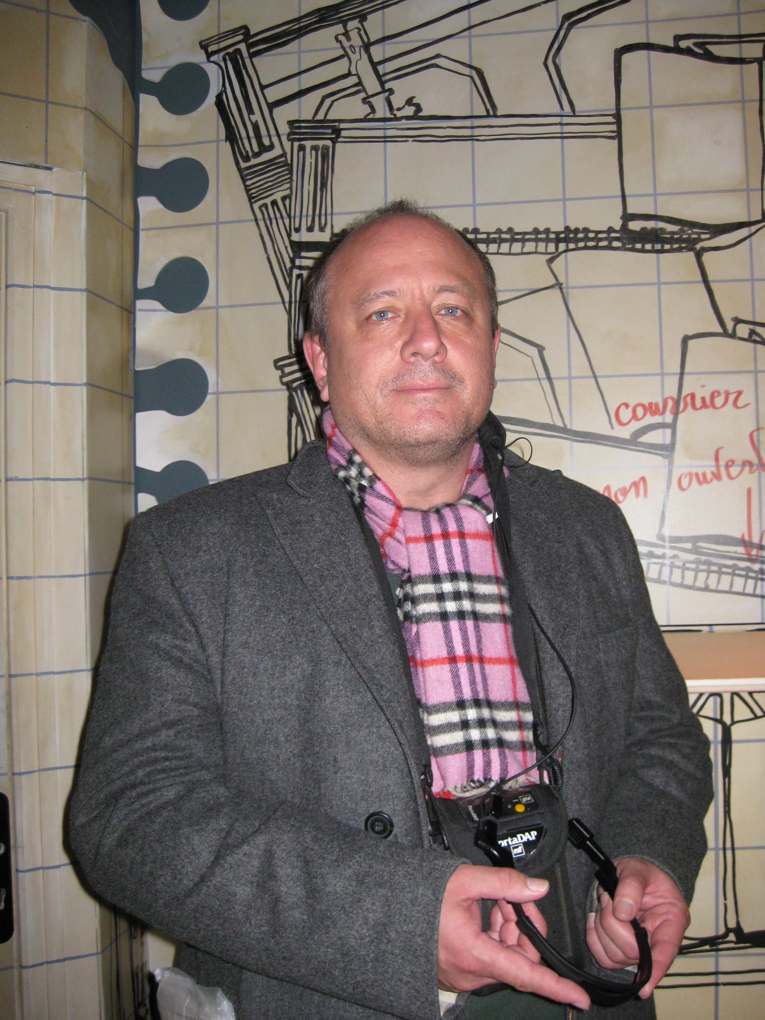 Photo de Carl Norac